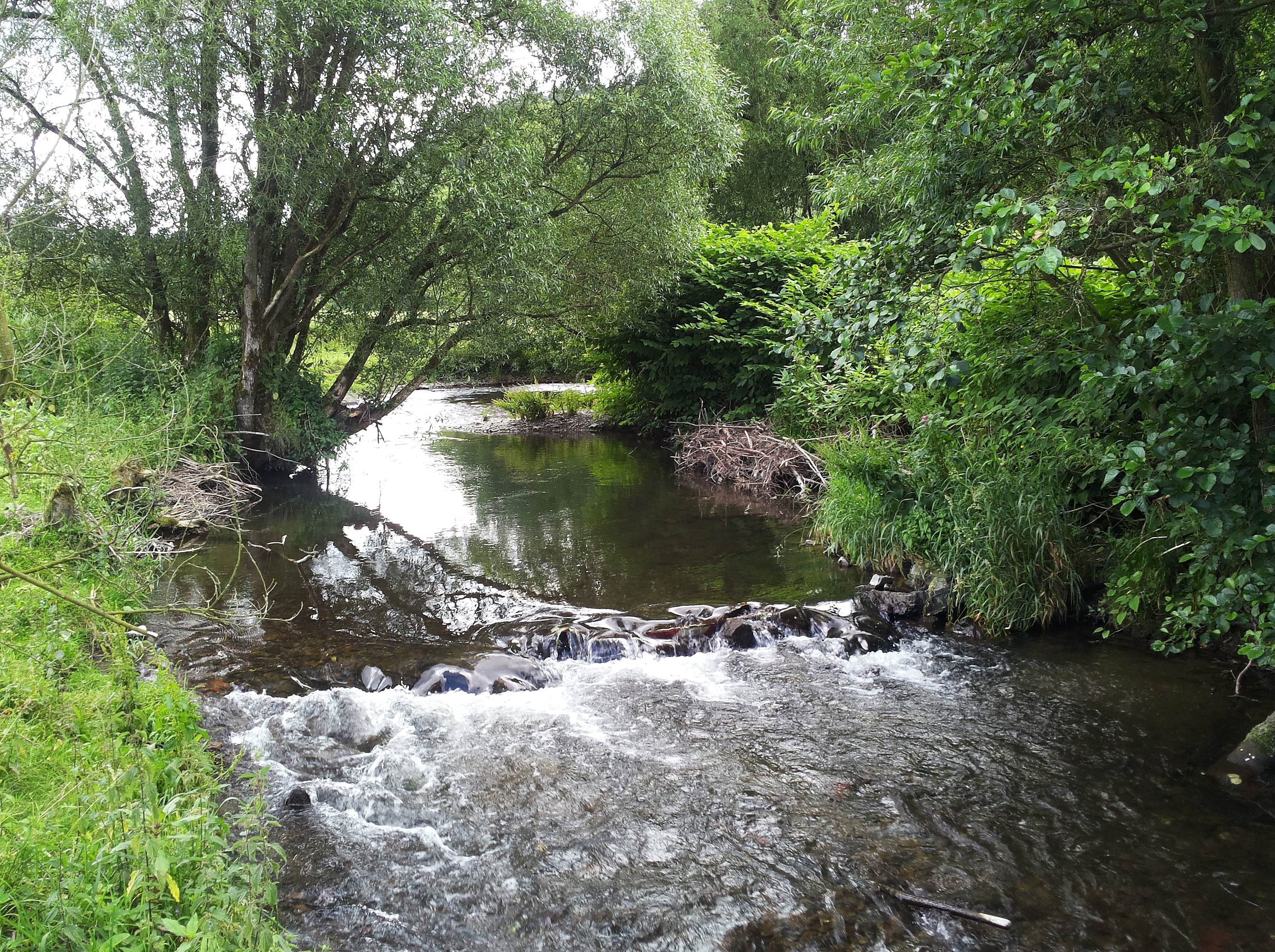 Die Lenne im Naturschutzgebiet „Lennetal unterhalb Schmallenberg“, Deutschland